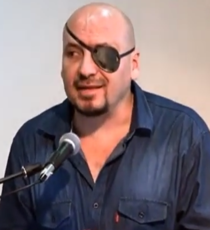 David Tezanos Pinto Ledezma en enero de 2019